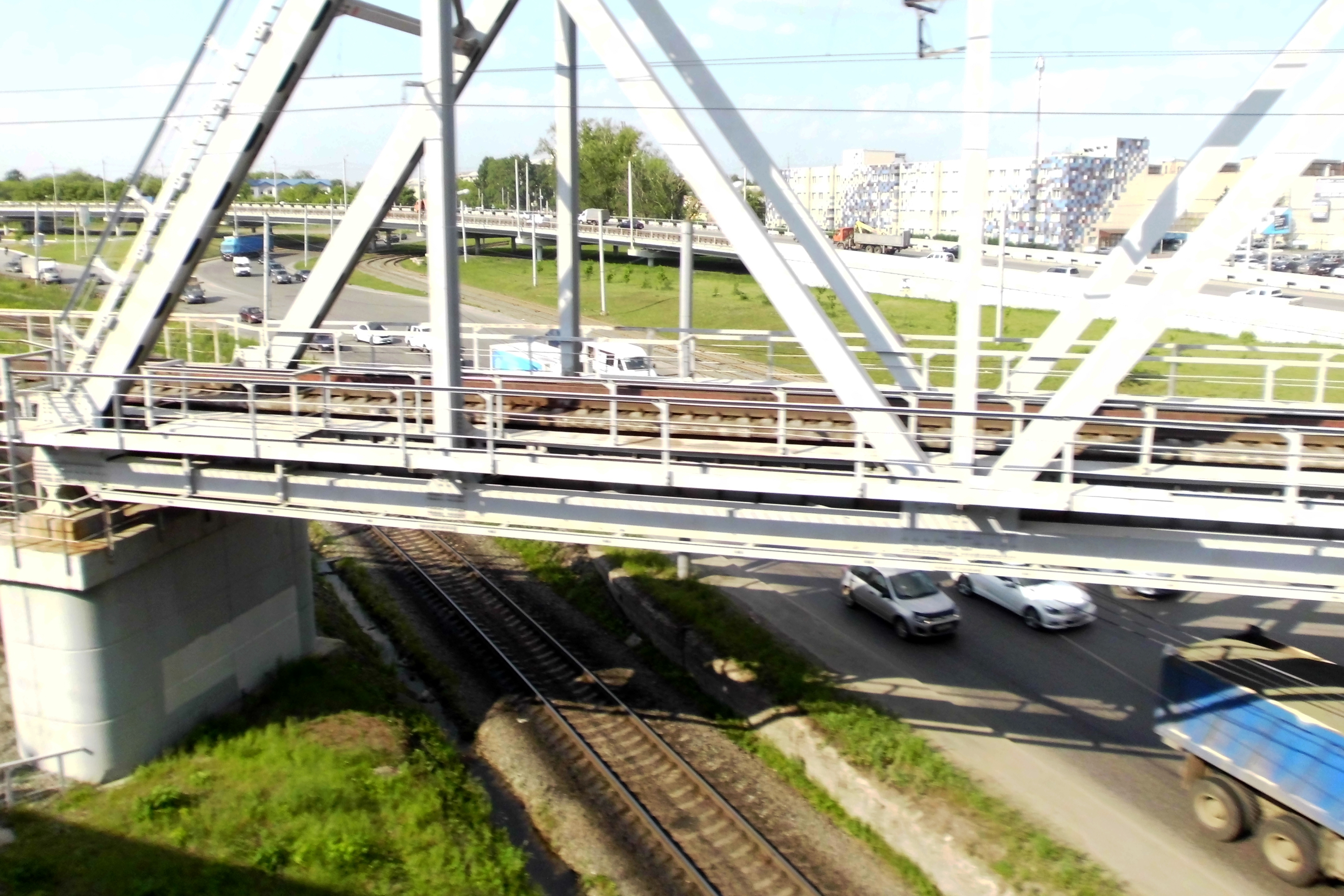 На ближнем плане - железнодорожный путепровод над (слева направо): железнодорожными путями, автомобильной дорогой (соединение "Меридиана" и ул. Рождественского), трамвайными путями. На дальнем плане - автомобильный путепровод над автомобильной дорогой и трамвайными путями. Россия, г. Челябинск.